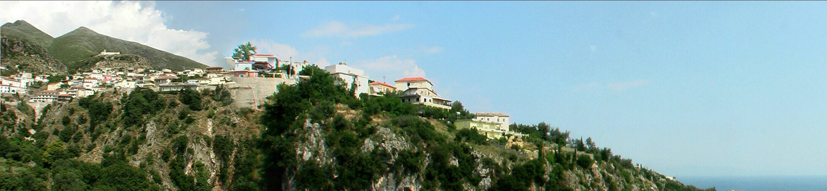 DhërmiPanorama